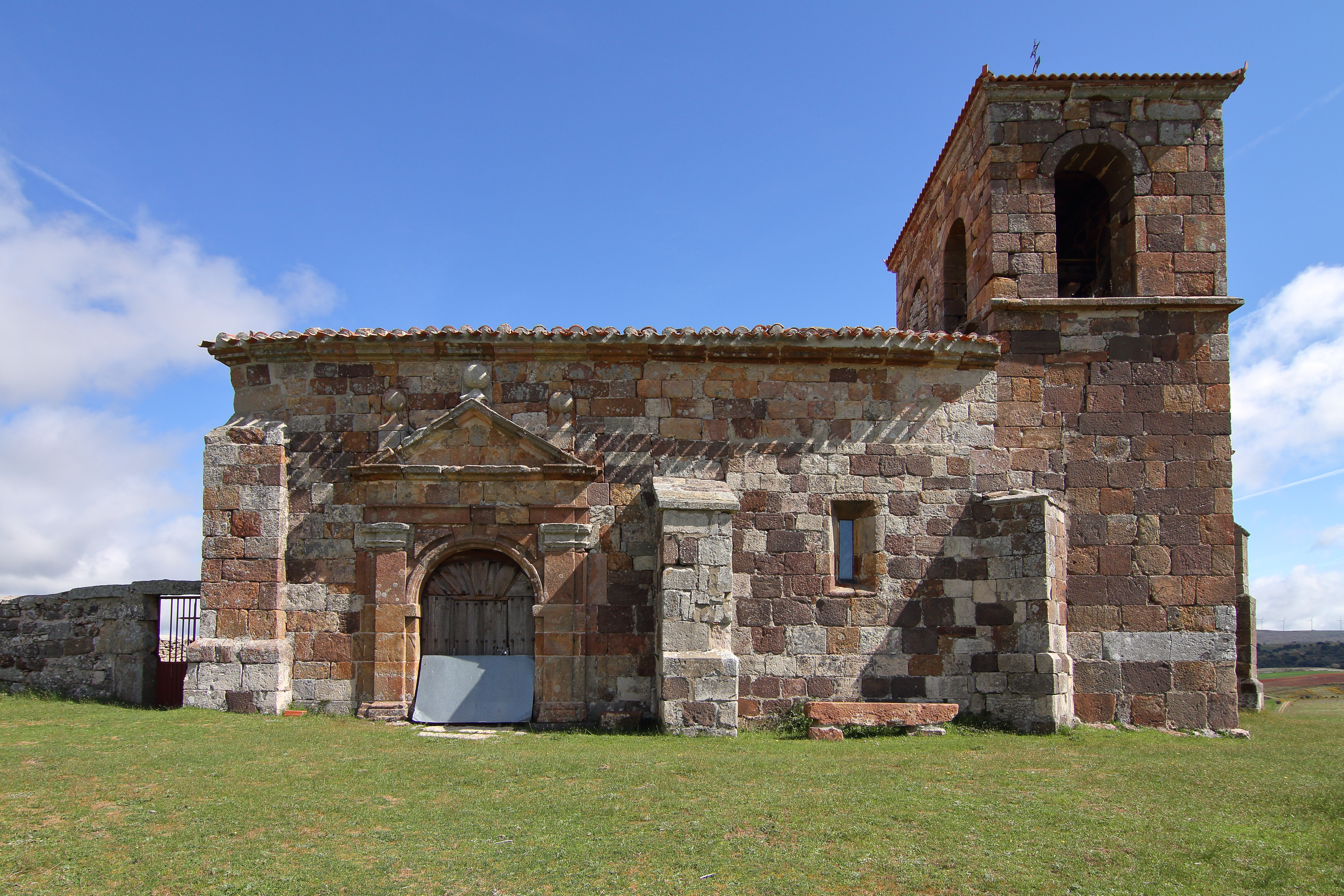 Torrelara, Iglesia de San Millán Abad, 06